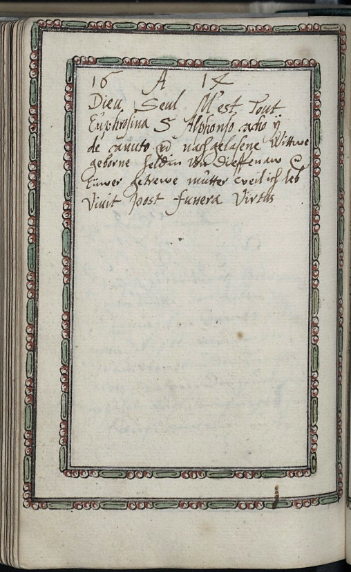 Eintrag der Euphrosina Heldin von Dieffenau im Stammbuch des David von Mandelsloh, 1614